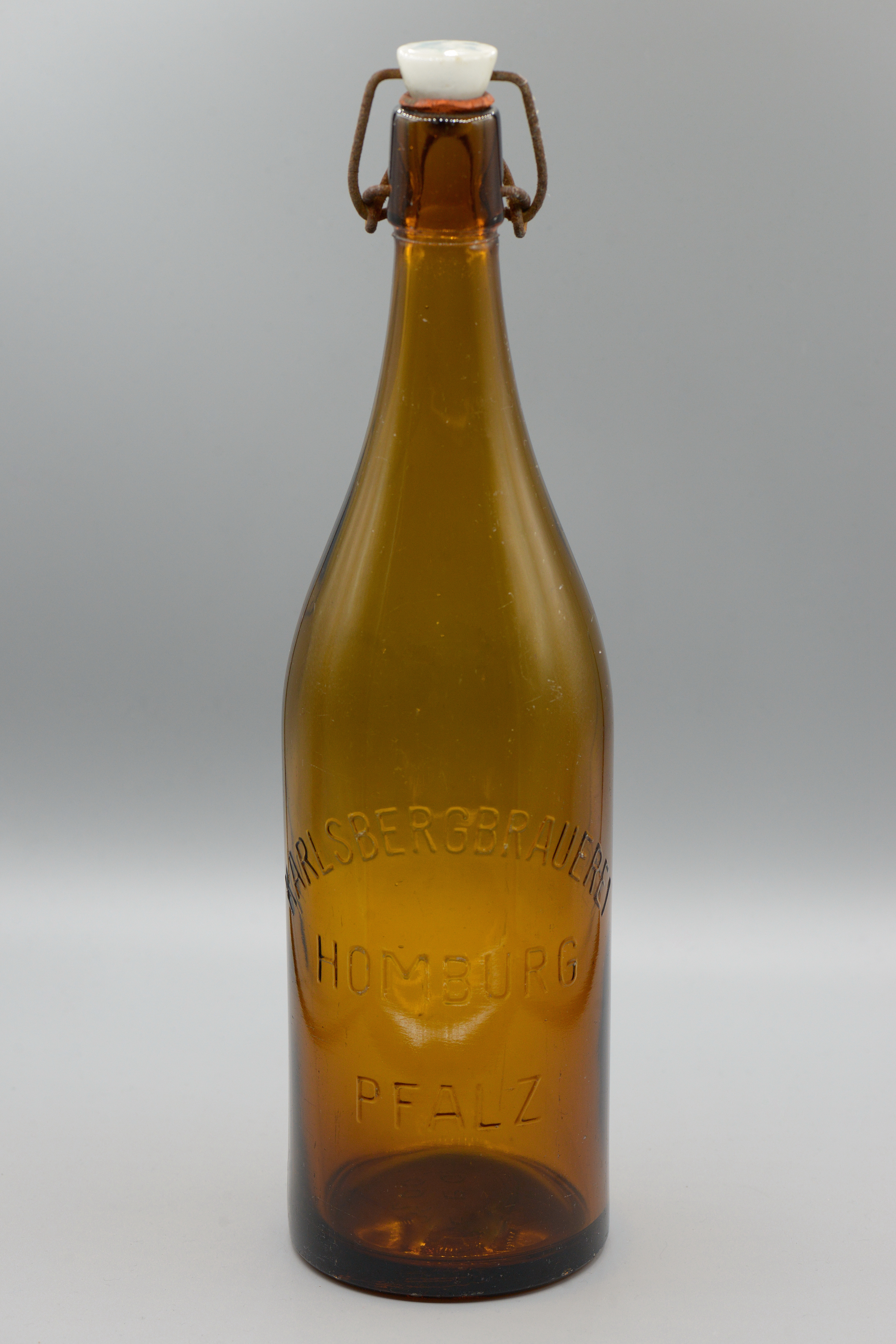 Alte Flasche der Karlsberg Brauerei in Homburg, Saarland/ Deutschland. Die Flasche ist mit Zapfen 33,3 cm hoch (ohne 31,7 cm), hat einen Bauchumfang von 28,5 cm und ein Volumen von 1,0 L (2019).